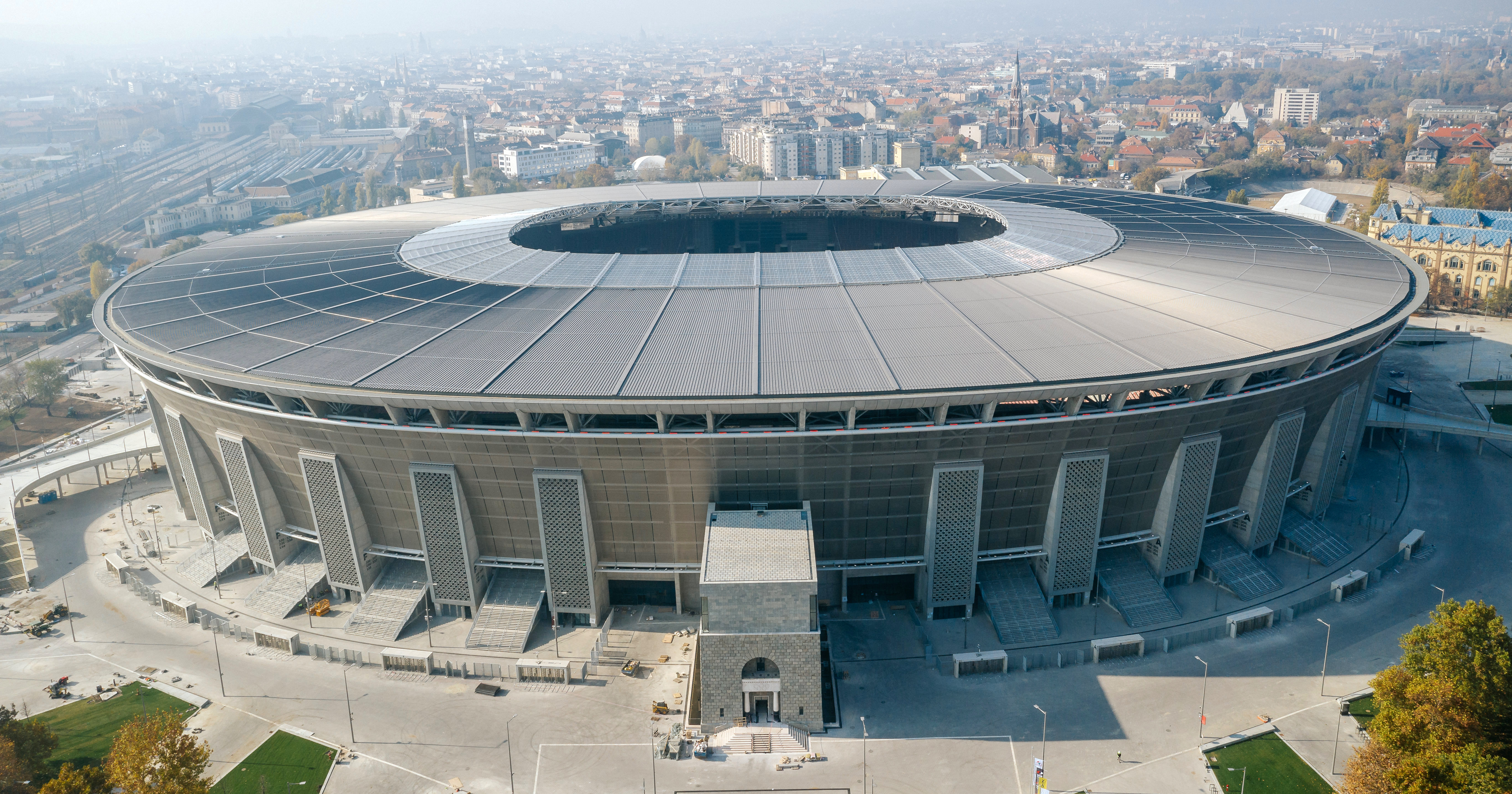 A Puskás Aréna légi felvétel